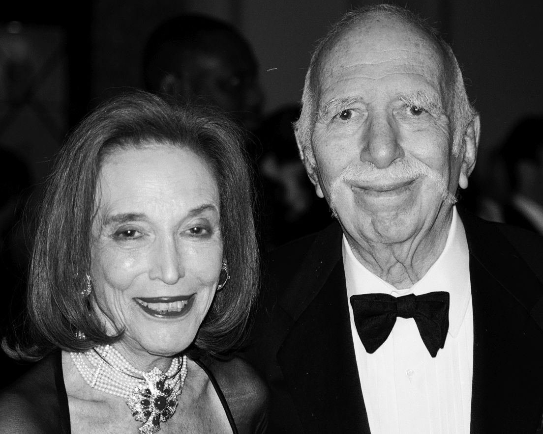 Wash D.C. 2000